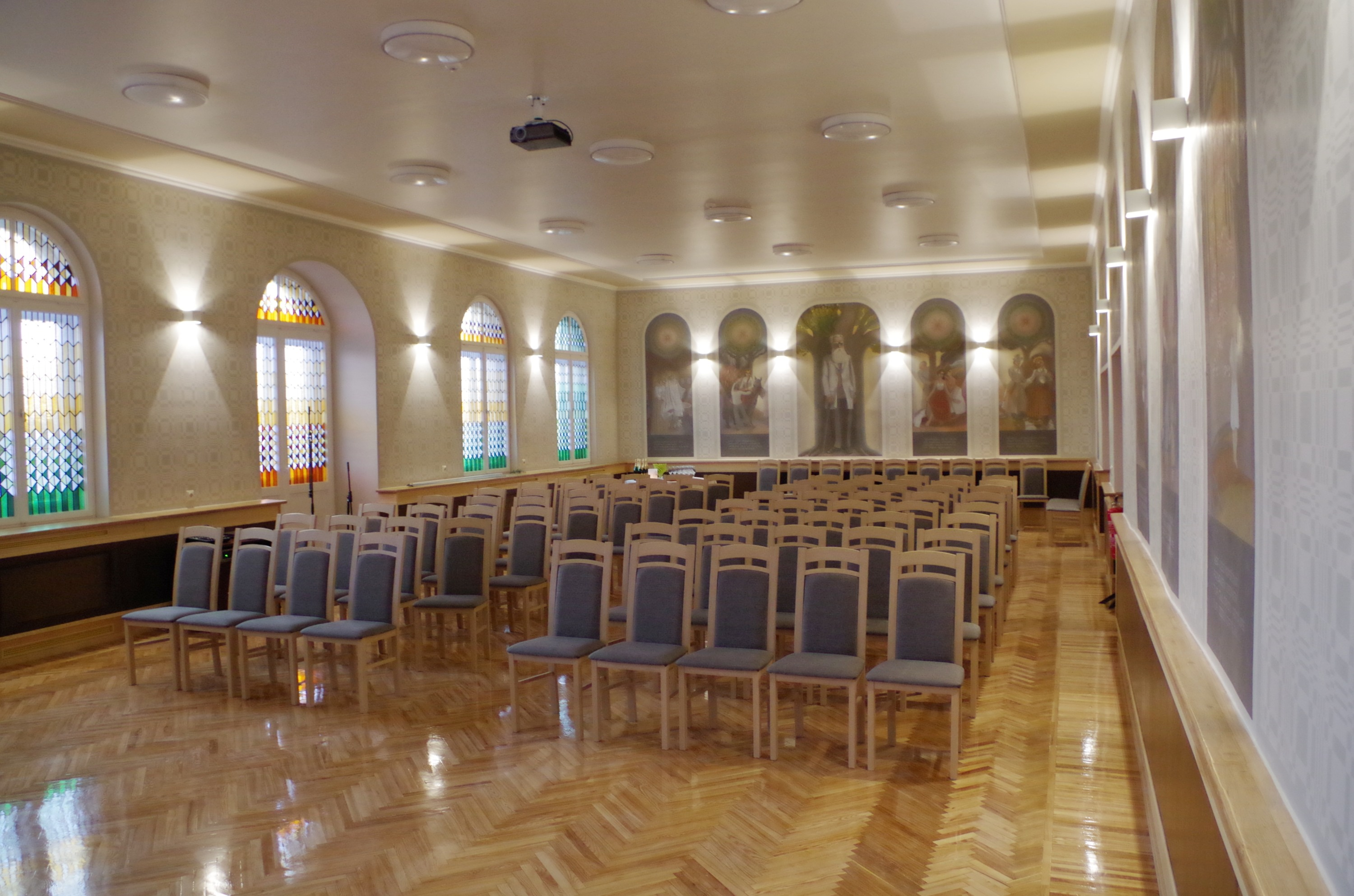 Jelgavas pilsētas bibliotēkas K. Barona zāle